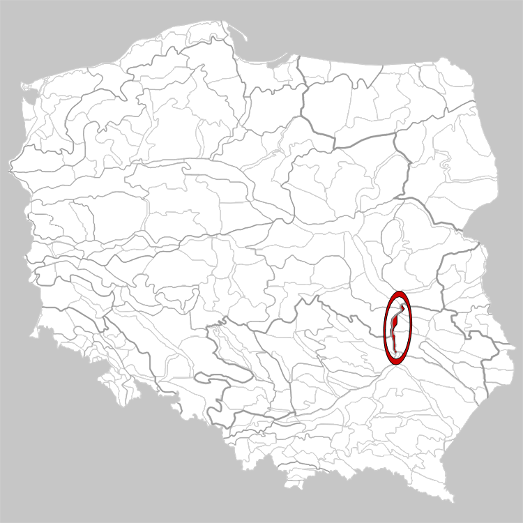 Physico-geographical regionalization of Poland Mezoregion 343.11 Little-Polish Vistula Defile Regionalizacja fizycznogeograficzna Polski Mezoregion 343.11 Małopolski Przełom Wisły